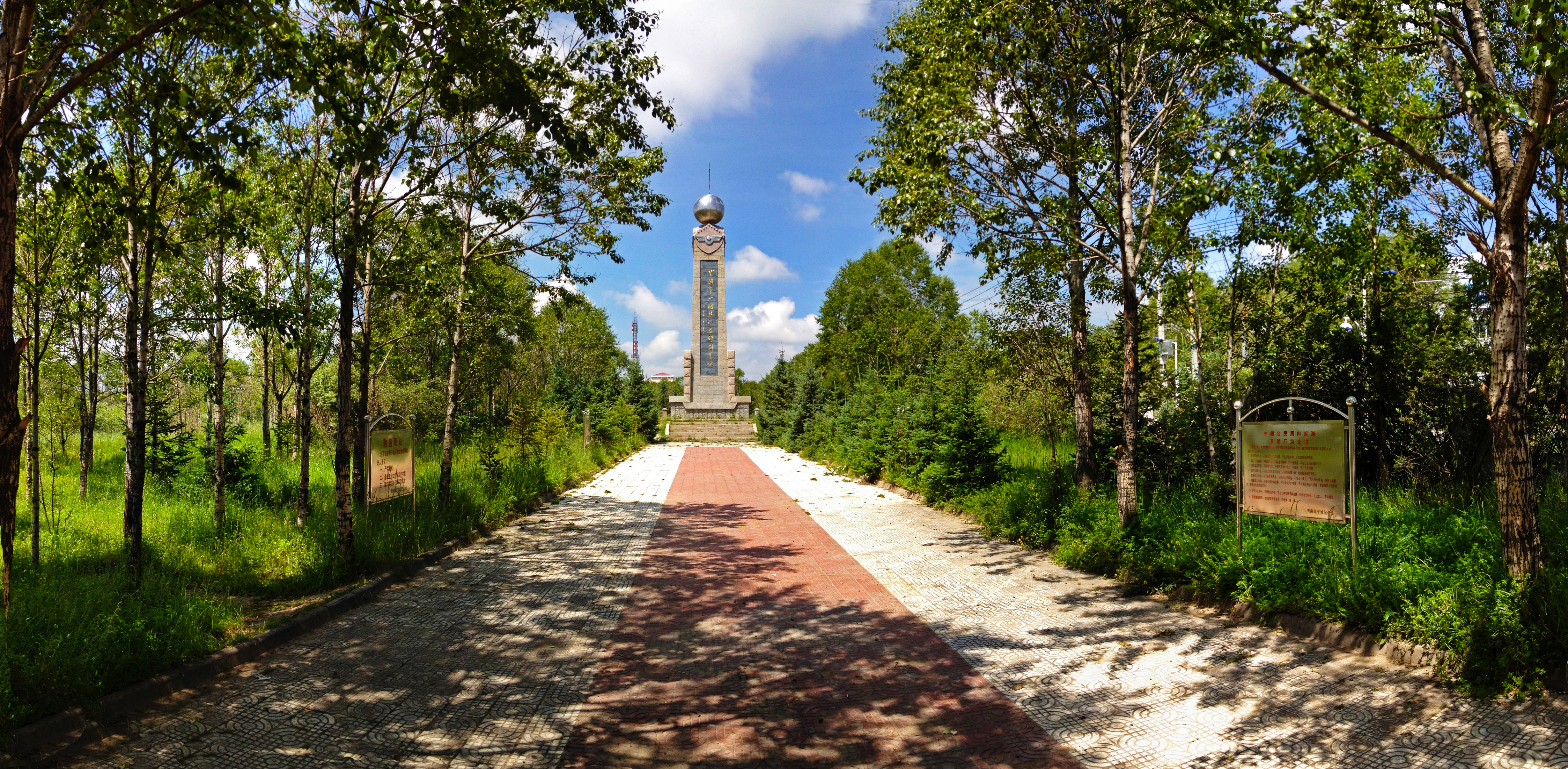 20120729青海湖西海镇中国原子弹爆炸纪念碑